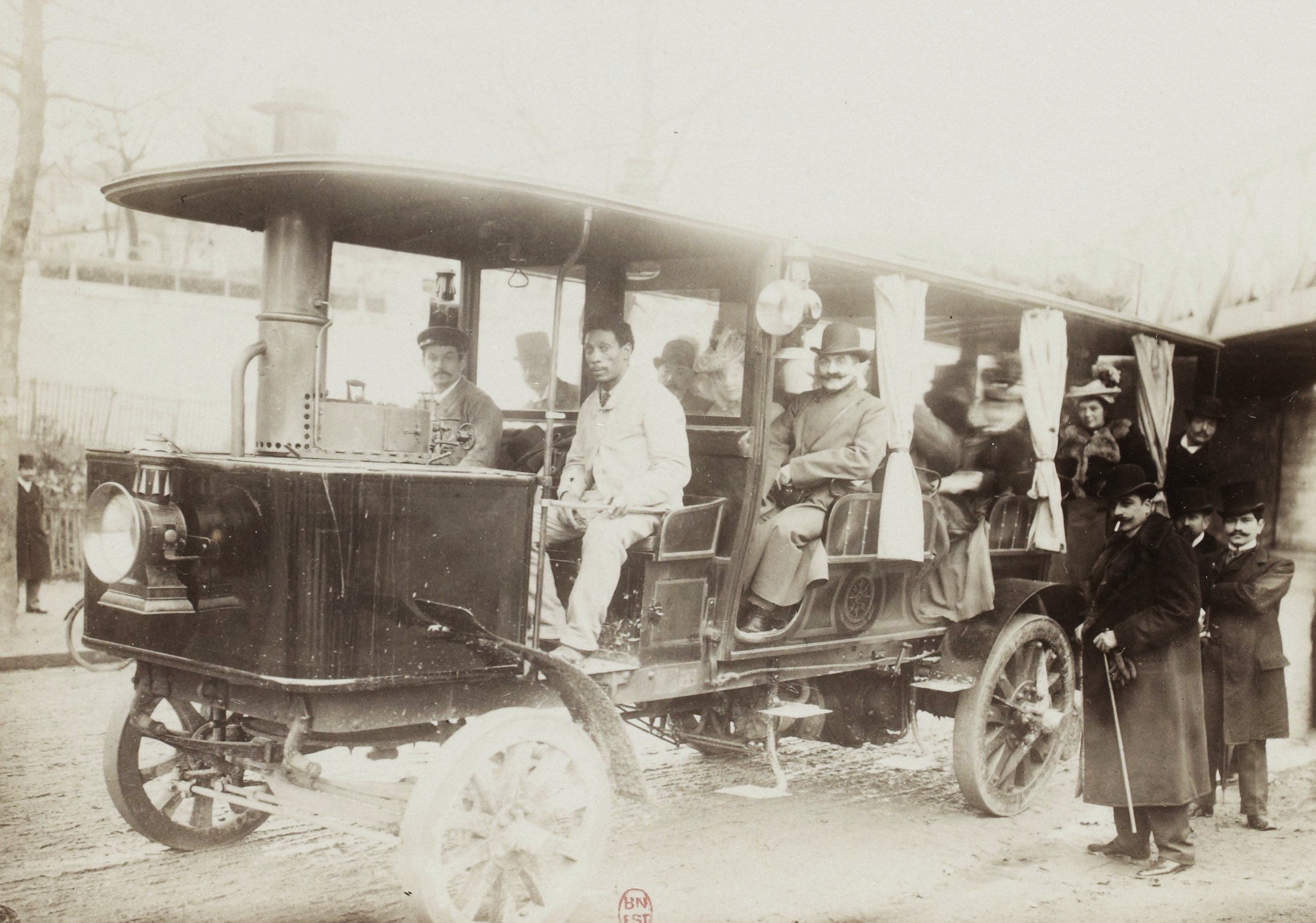 [Collection Jules Beau. Photographie sportive] : T. 8. Années 1898 et 1899 / Jules Beau